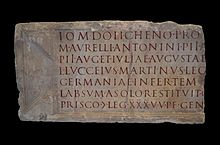 iscrizione romana ritrovata a colonia in germania